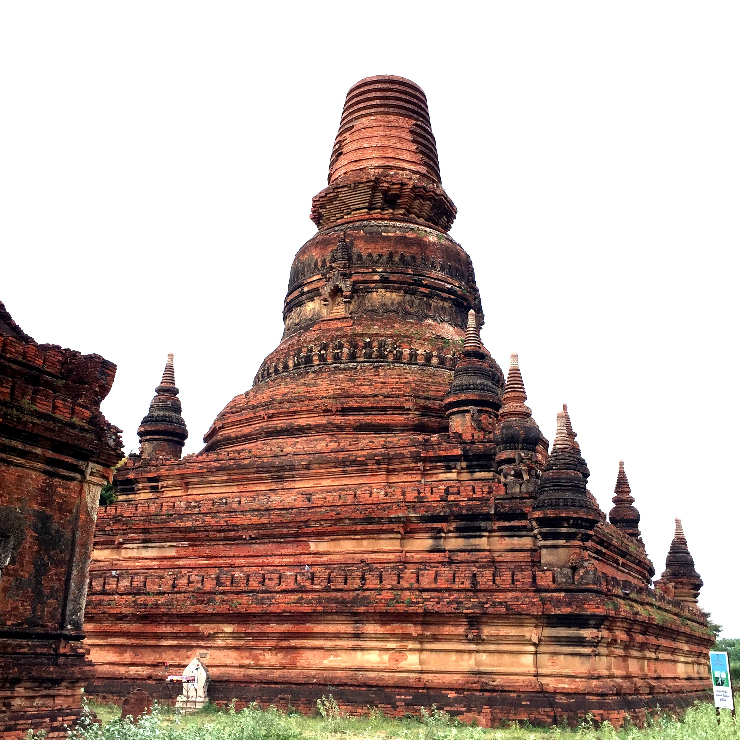 မြန်မာဘာသာ: စိမ်းညက်ညီမ ဘုရား(ပုဂံ)